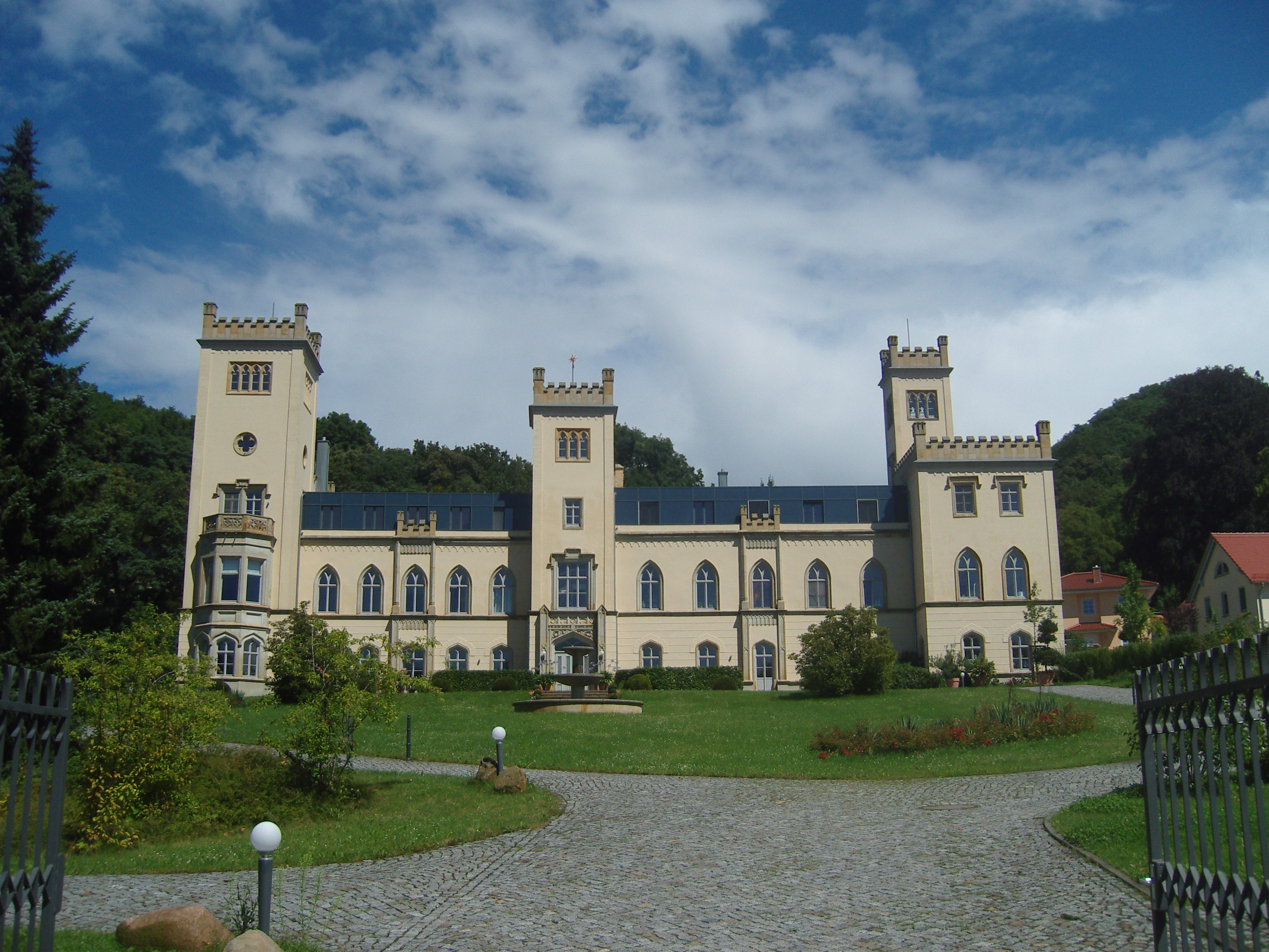 Denkmalgeschütztes Keppschloss in der Dresdner Straße 97 in Dresden